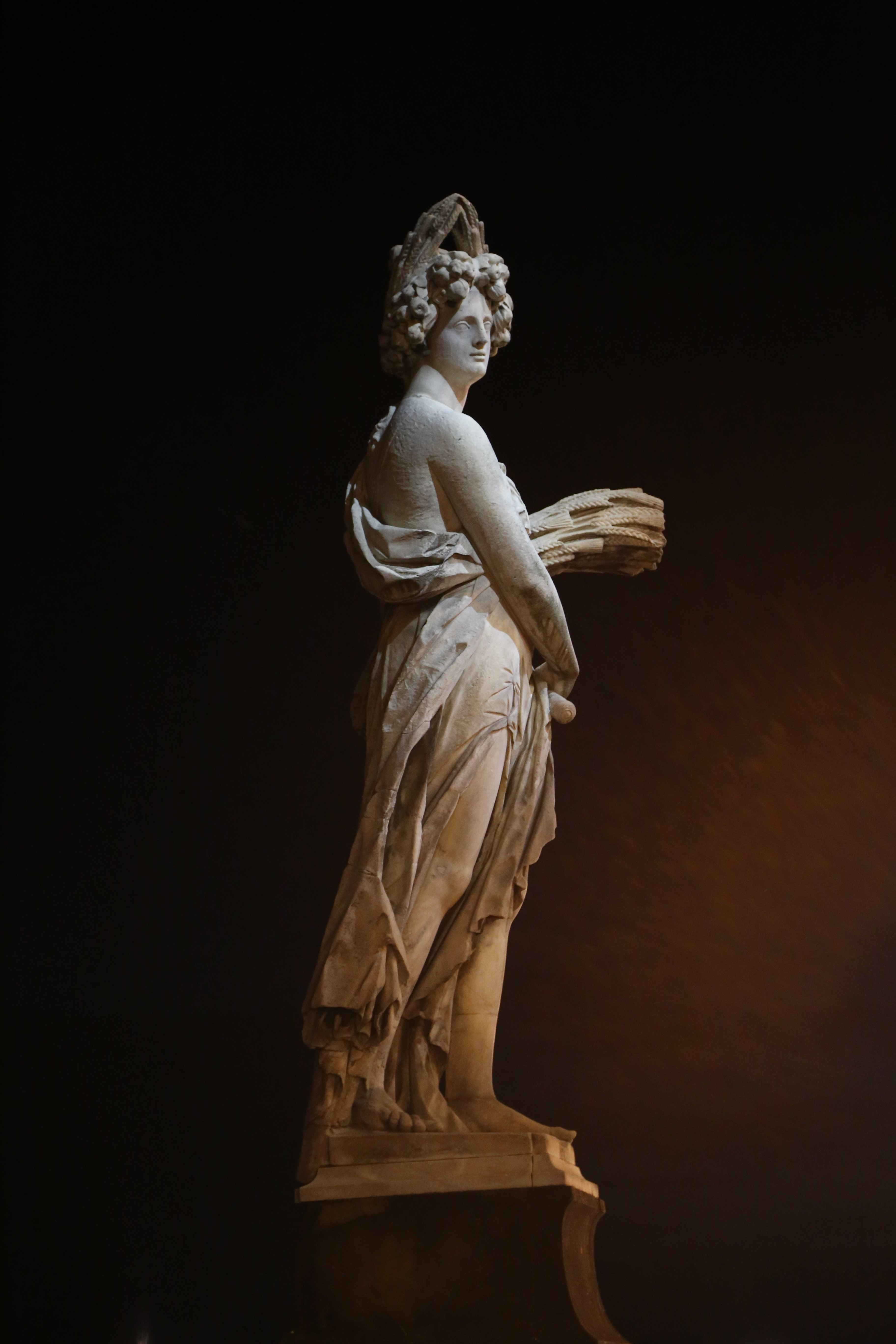 Statue (Sommer) von Giovan Battista Caccini, Ponte Santa Trinita, Florenz